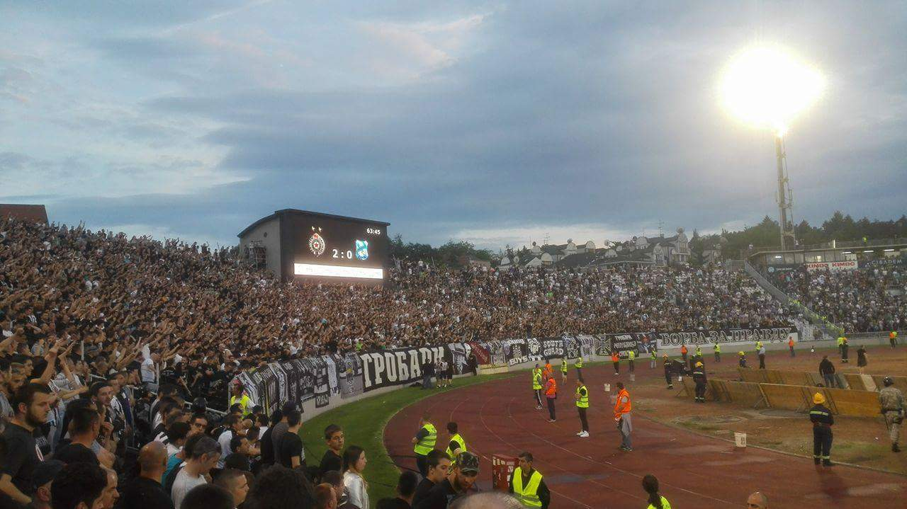 Srpski (latinica): Grobari slave titulu u utakmici 37. kola Super lige Srbije odigranoj 21. maja 2017.